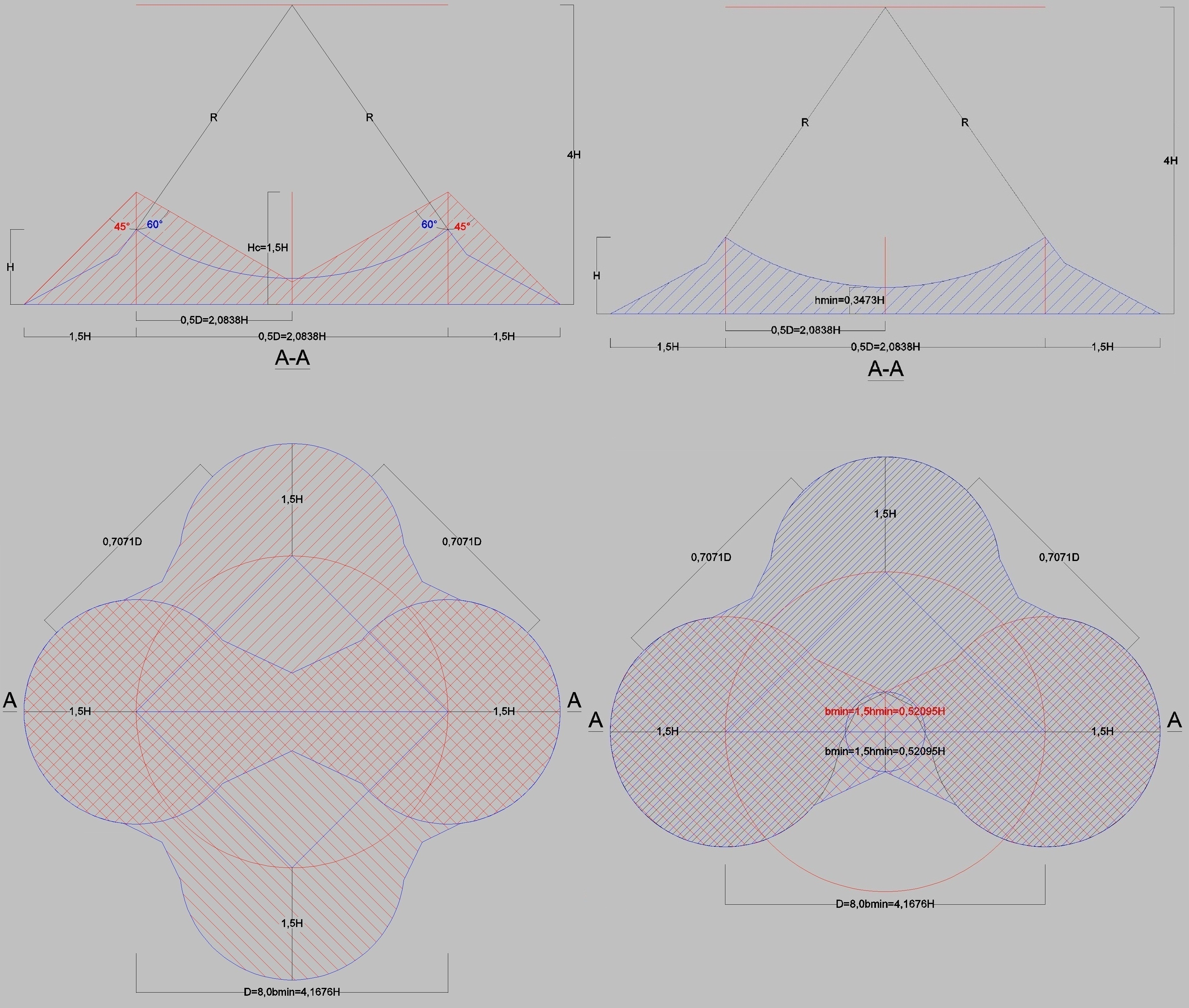 Phạm vi bảo vệ của hệ thu lôi 3 kim cao bằng nhau, nằm trên đường tròn ngoại tiếp đường kính là D=8bmin=0,41676H. Theo tiêu chuẩn thiết kế chống sét Việt Nam TCXD 46:1984, trang 23-24.